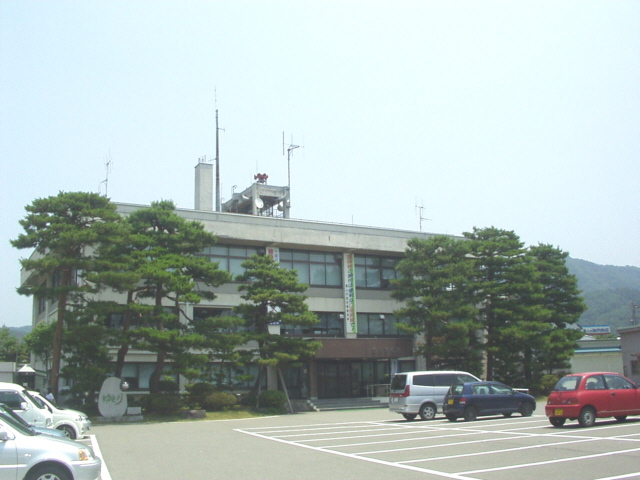 Katsuyama City Hall in Fukui Preferture, Japan(Ja:勝山市役所)